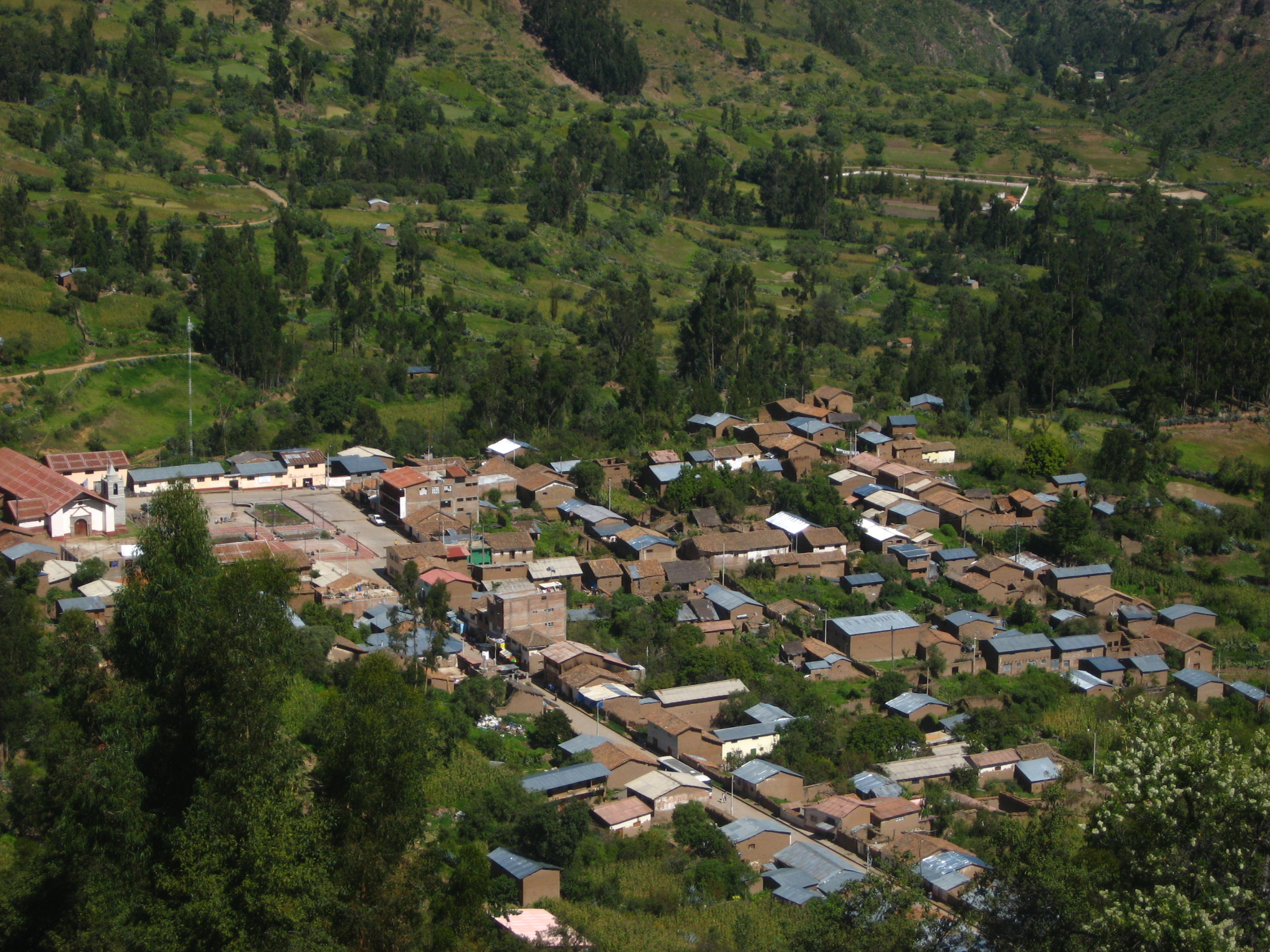 fotografia de plaza del distrito de Vischongo